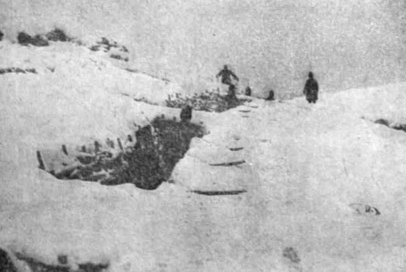 D - Transee inzapezite iarna 1917 Kiritescu II 420